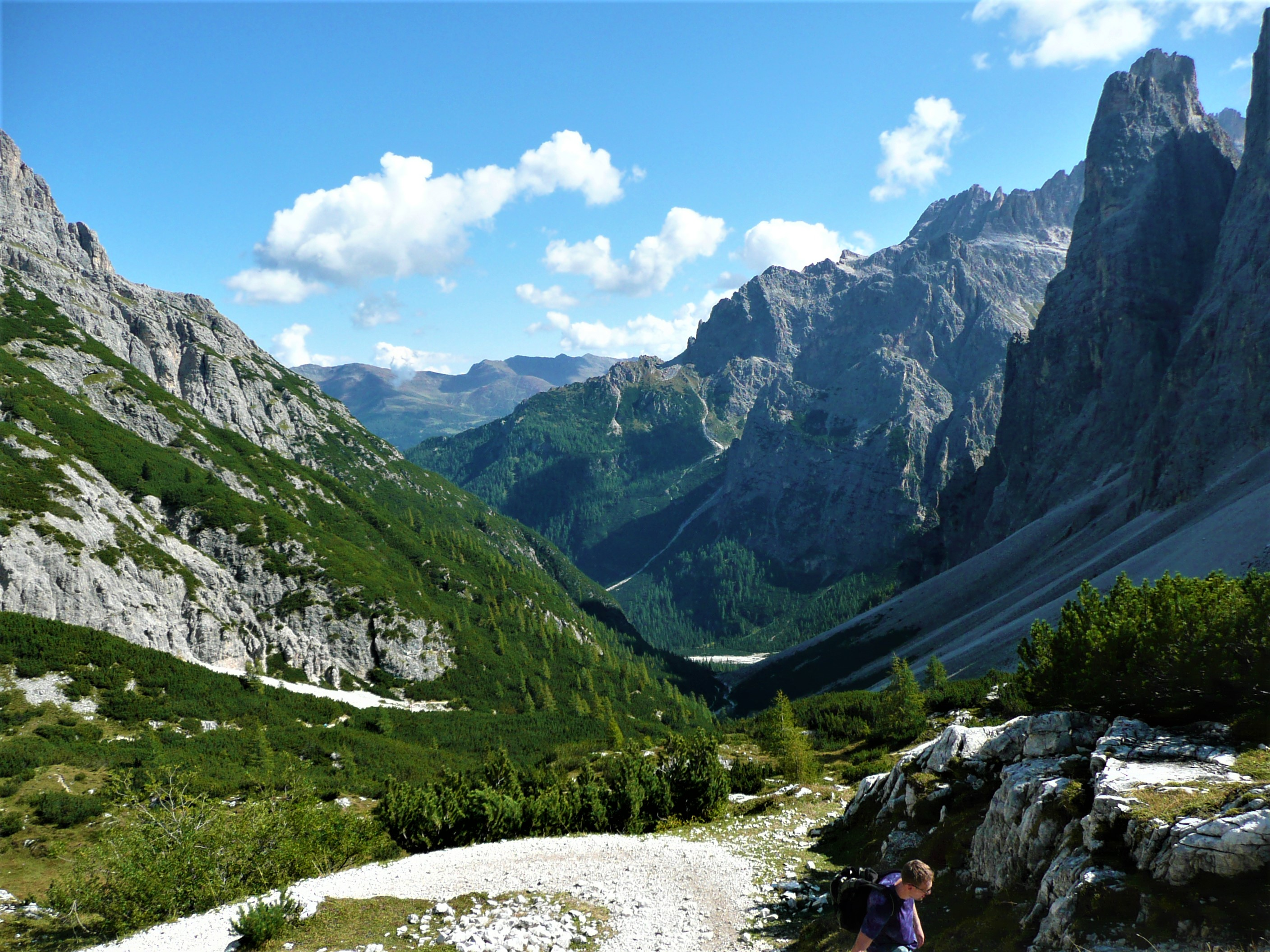 Ansicht des Altensteiner Tales mit Einserkofel (rechts) Blickrichtung Fischleintal